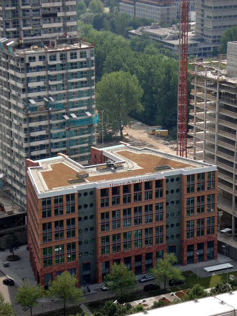 Zuidas